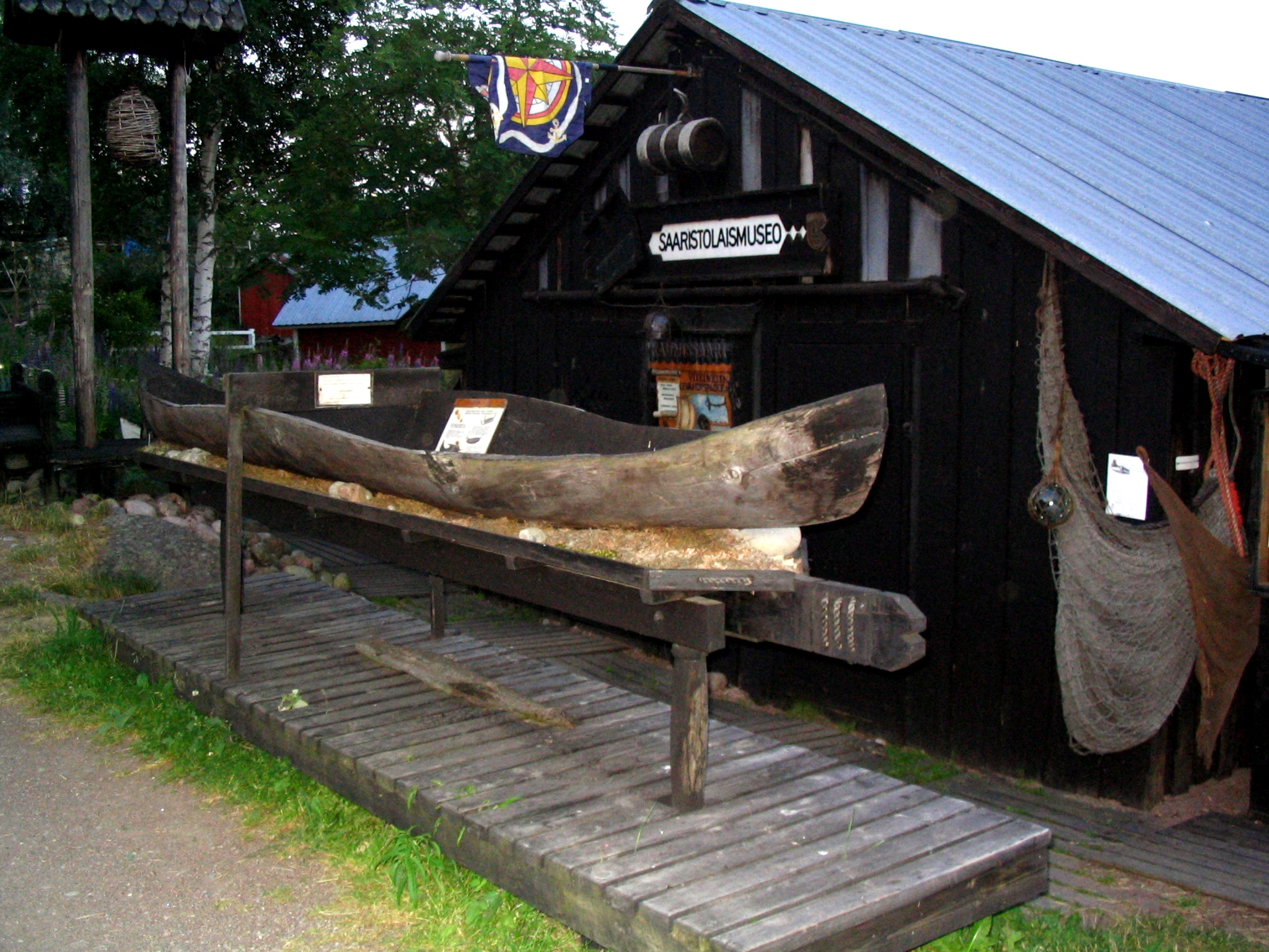 Saaristolaismuseo Pyhtään Kaunissaaressa.